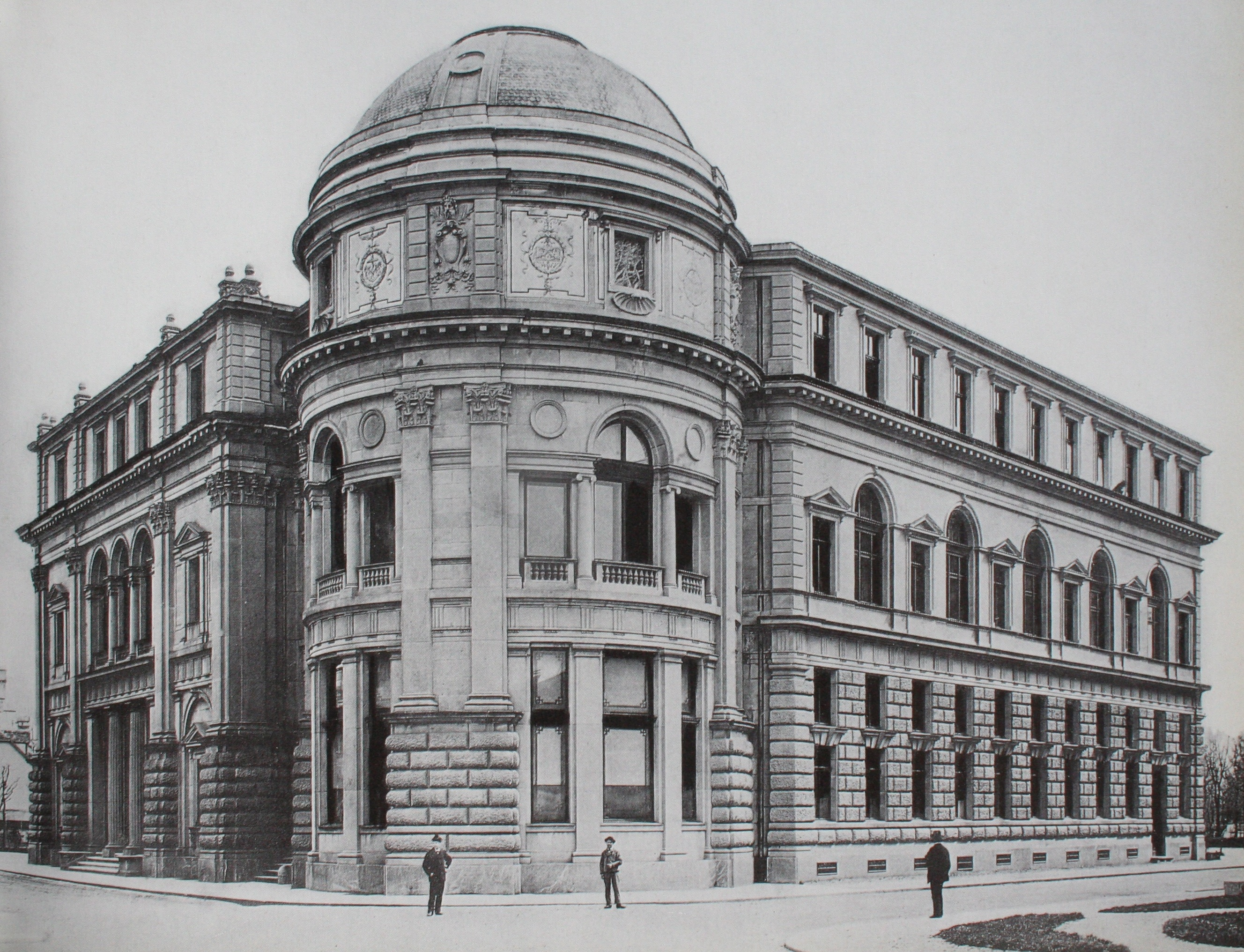 Alte Börse, erbaut 1878 - 1880, Ecke Talstrasse/Börsenstrasse. Links die letzte Häusergruppe des Kratzquartiers.